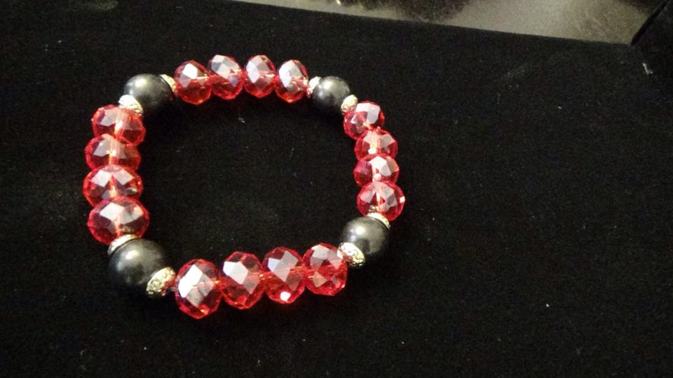 sungit ékszer